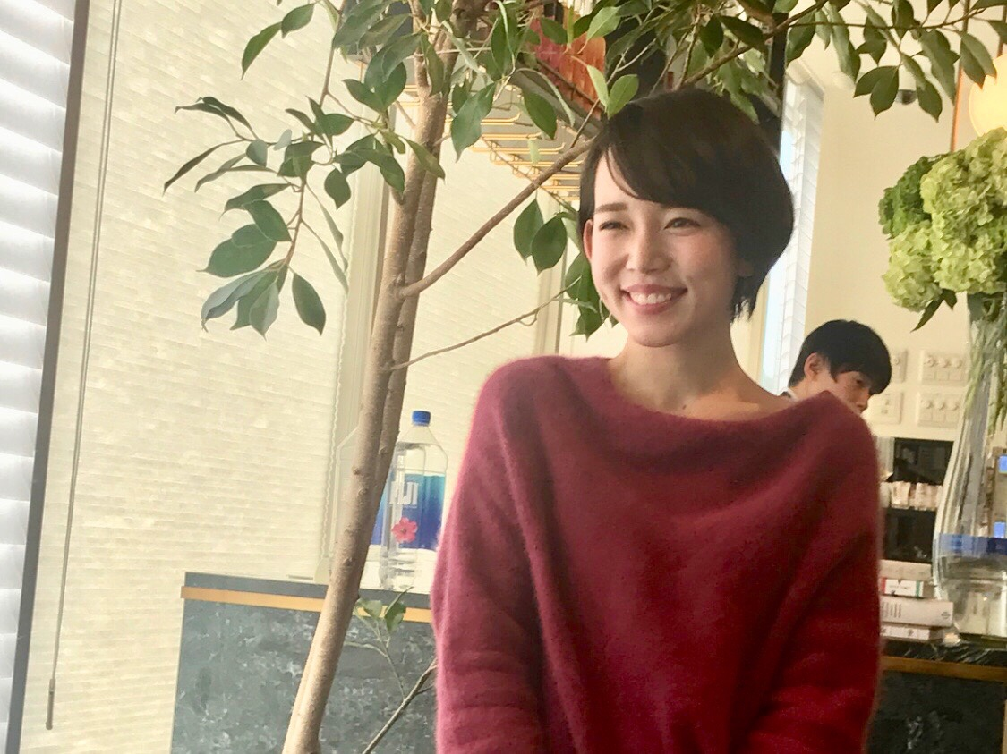 2017.11.11開催motojimasaori×FIJIWaterイベント